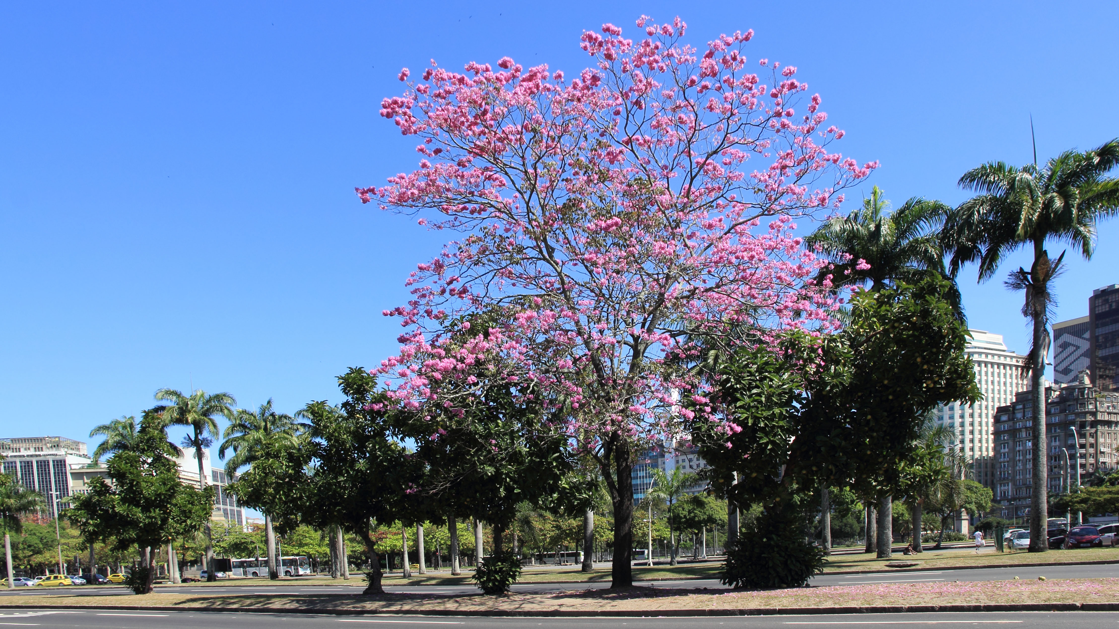 Ipê-rosa - Tabebuia pentaphylla - Parque do Flamengo - Aterro da Glória.